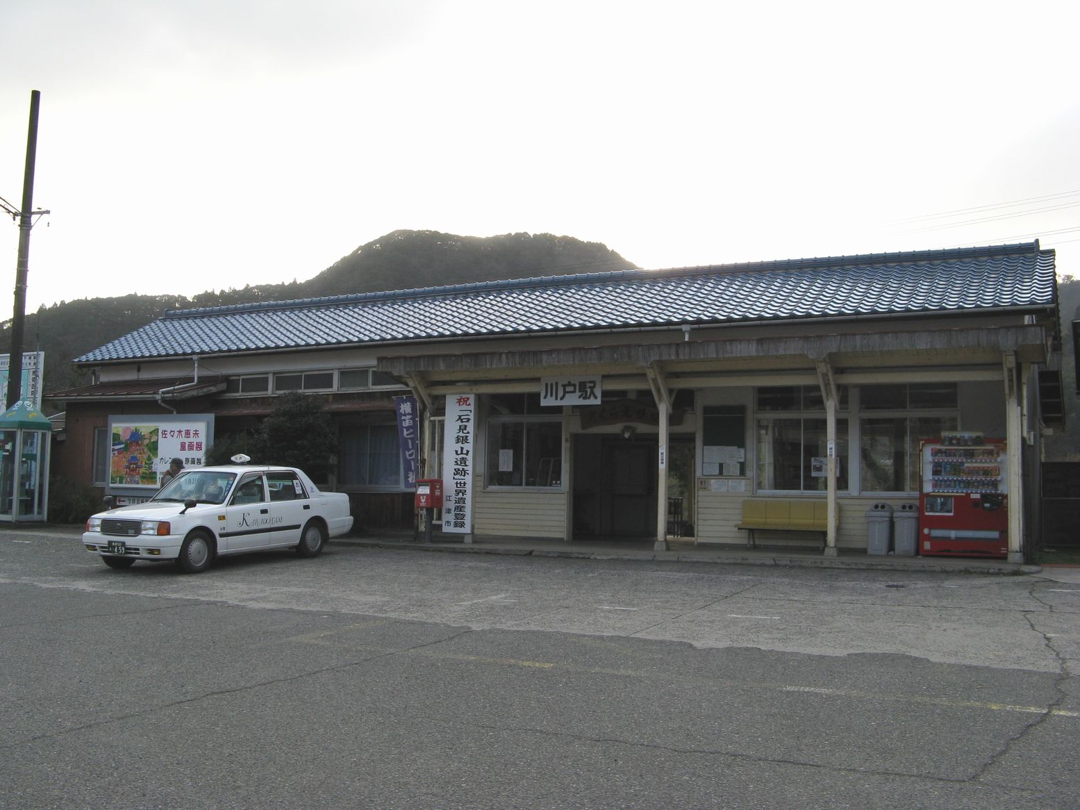 川戸駅 2008年1月9日 Bakkai撮影